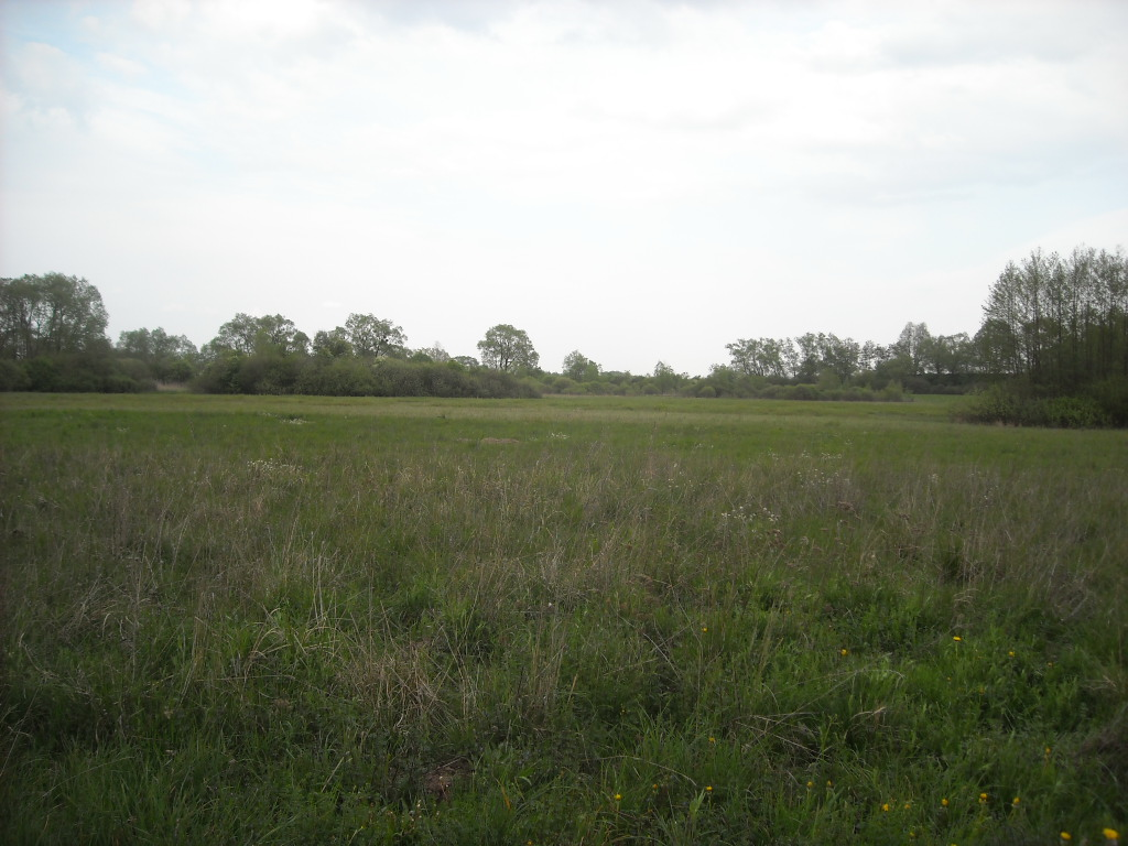 Łąka łęgowa nad rzeką Huczwą, pow. hrubieszowski